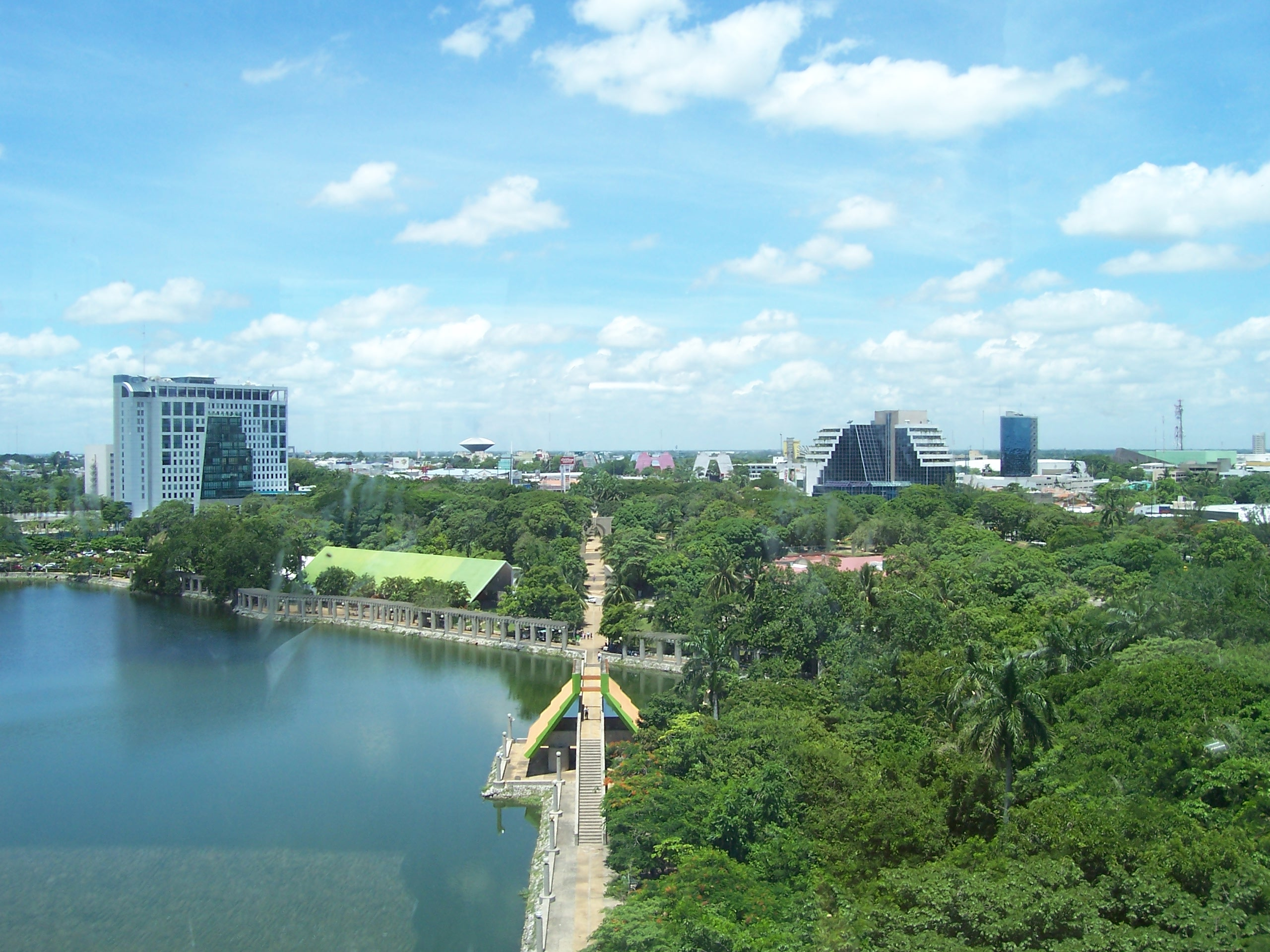 Vista desde lo alto en parque Tomas Garrido, Villahermosa, Tabasco. Panorámica de Villahermosa desde el Mirador de las Águilas, Se aprecian la Laguna de las Ilusiones y varios de los edificios más altos de la ciudad.